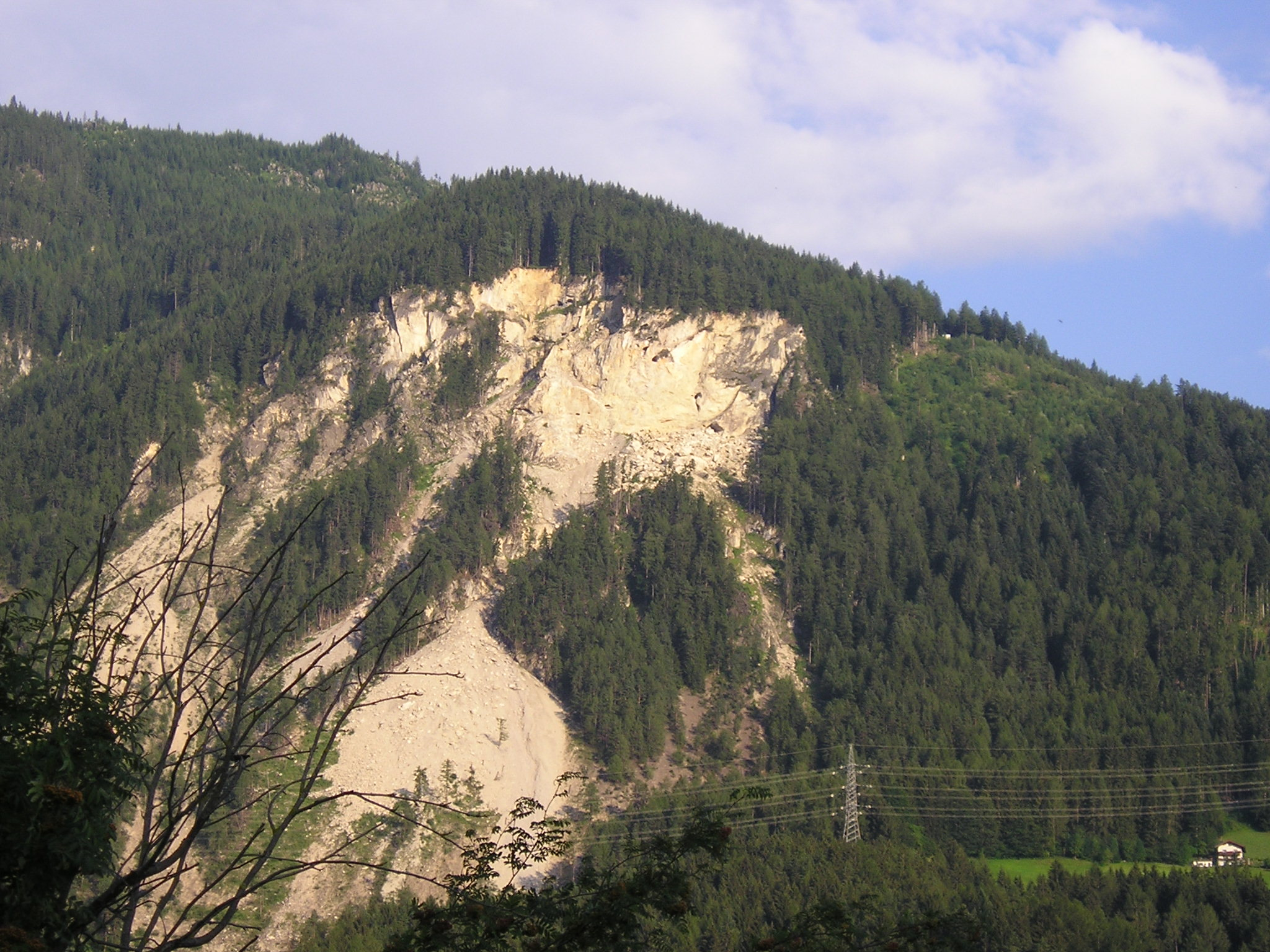 Der Eiblschrofen seit dem Jahr 1999